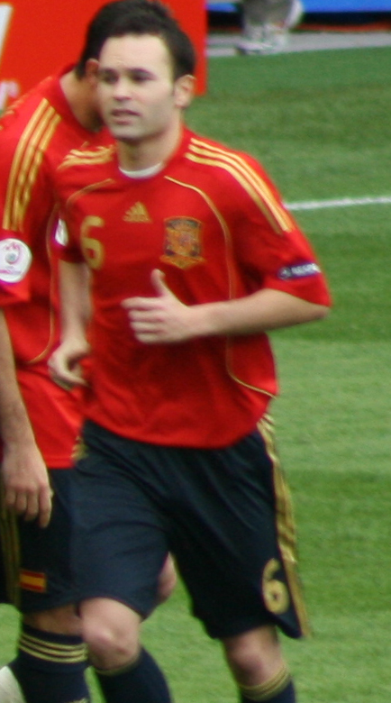 Los jugadores saltan al campo antes del partido Suecia - España de la Eurocopa 2008, en el estadio Tivoli Neu (Innsbruck)